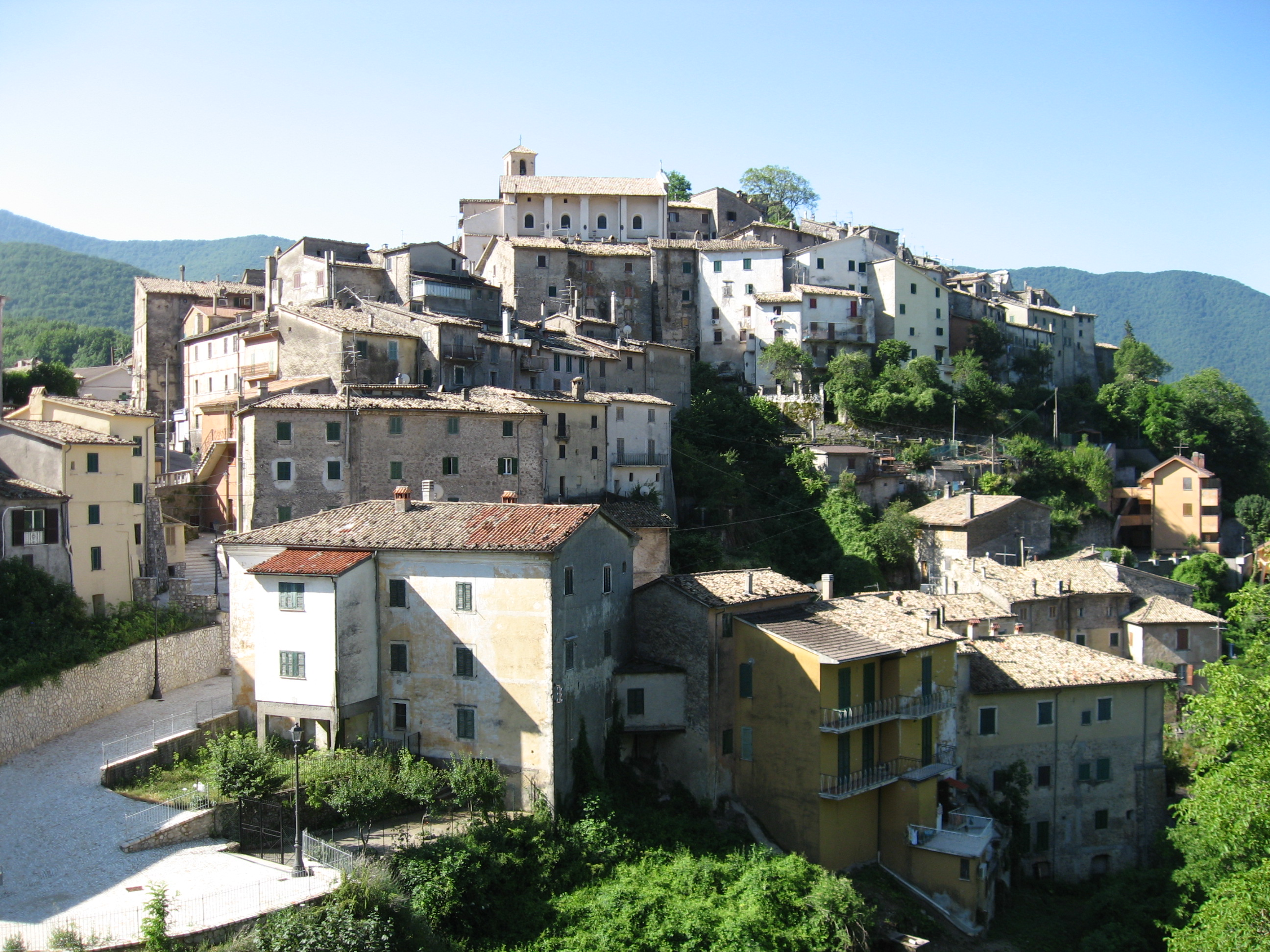 Zicht op Filettino